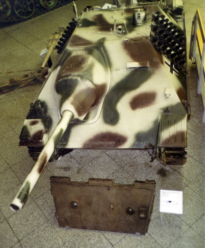 Jagdpanzer 38 Hetzer (höchstwahrscheinlich aber eher die Schweizer Version G-13) (Ausgestellt im Militärhistorischen Museum der Bundeswehr in Dresden) - Im Vordergrund eine Original-Bugplatte eines Hetzers